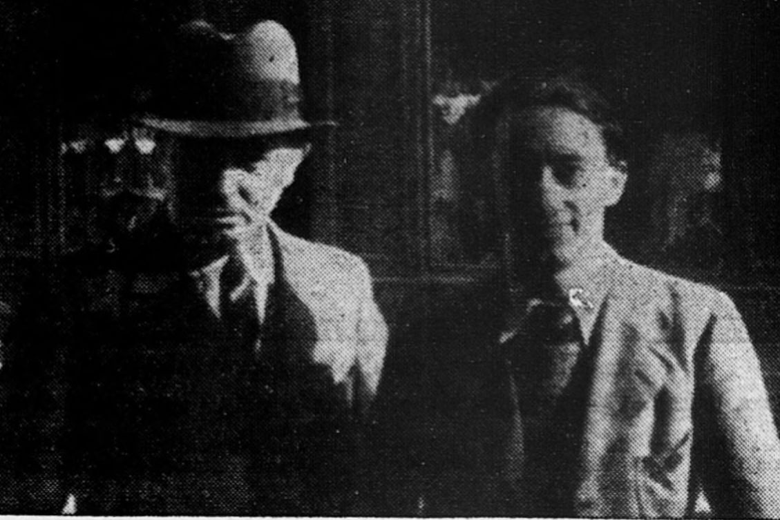 arrestation de René Caoussin (à droite de l'image), secrétaire administration du journal Breiz Atao en 1938 à Rennes